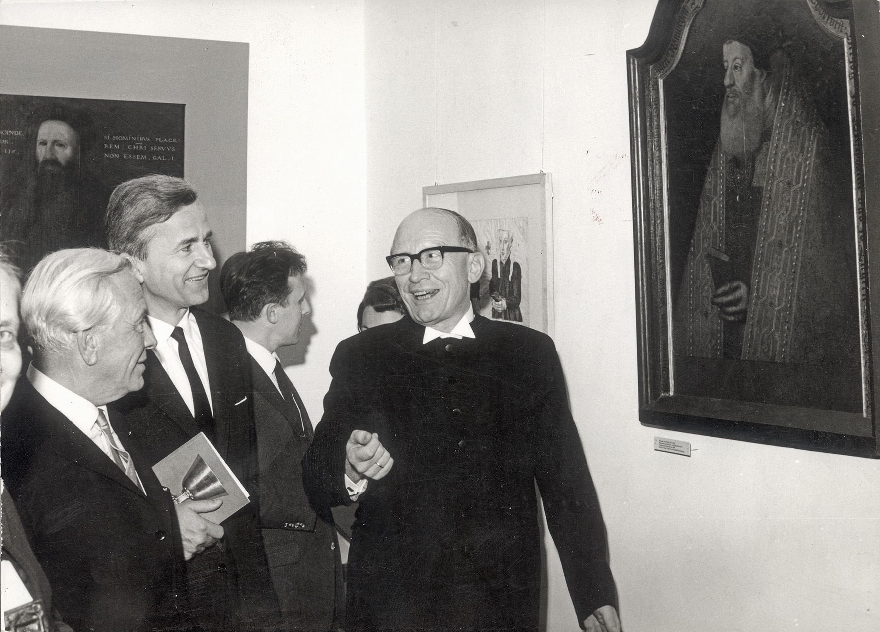 Deutscher Evangelischer Kirchentag Ausstellung Reformation Köln 1965, Kirchentagspräsident Richard von Weizsäcker im Gespräch mit Präses Joachim Beckmann, Foto: Günter Jagenburg, Leverkusen Fotosammlung: Presseverband, Nr. 1687, Bestand: AEKR Düsseldorf 8SL 046 (Bildarchiv), 13_19650000B